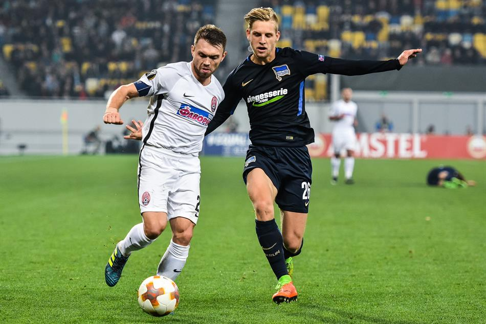 Zorya VS. Hertha BSC 2 - 1